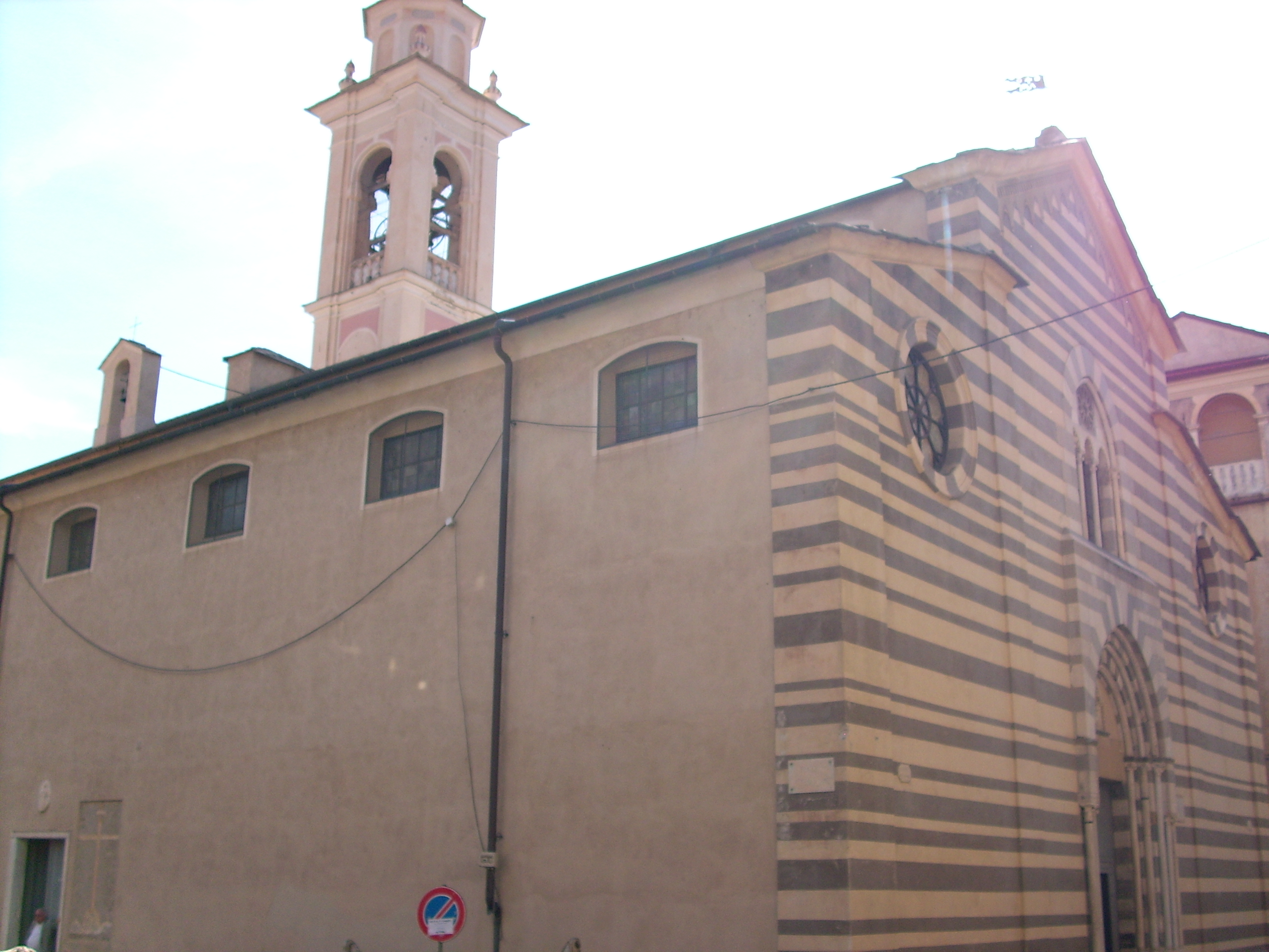 Centro storico di Albenga, Liguria, Italia